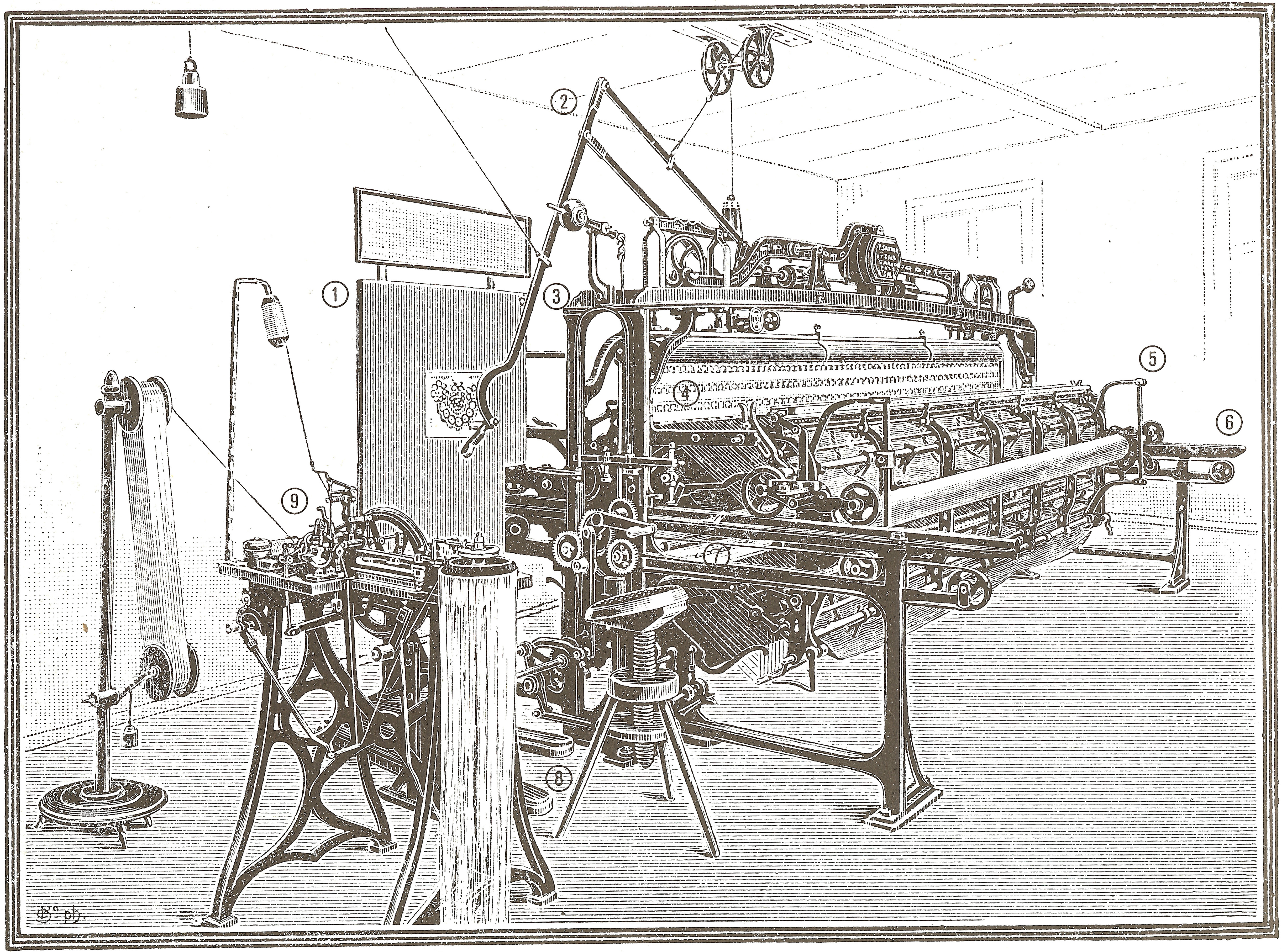 Handstickmaschine mit Fädelmaschine um 1890 1: Musterbrett mit aufgehefteter Vorlage 2: Pantograph zum Bewegen des Stickbodens 3: Gatter 4: Stickboden (zu bestickendes Tuch) 5: vorderer Wagen 6: Wagentransportschiene 7: Kurbel zum Bewegen des Wagens 8: Abtretvorrichtung (zum öffnen/schliessen der Greifer) 9: Fädelmaschine